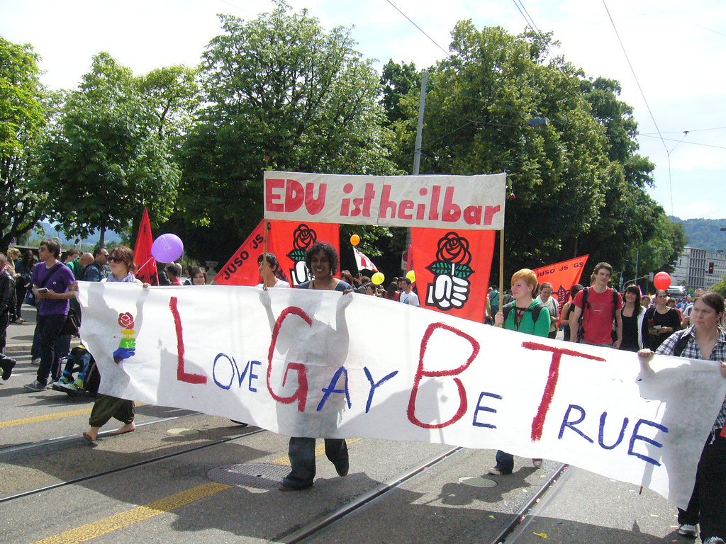 Europride 2009 in Zürich. Gruppe der JungsozialistInnen Schweiz mit dem Spruch: "Love Gay Be True" ("Homosexuell lieben ist wahr", LGBT bedeutet original: "Lesbian, Gay, Bisexual, Transgender") Dahinter: "EDU ist heilbar".